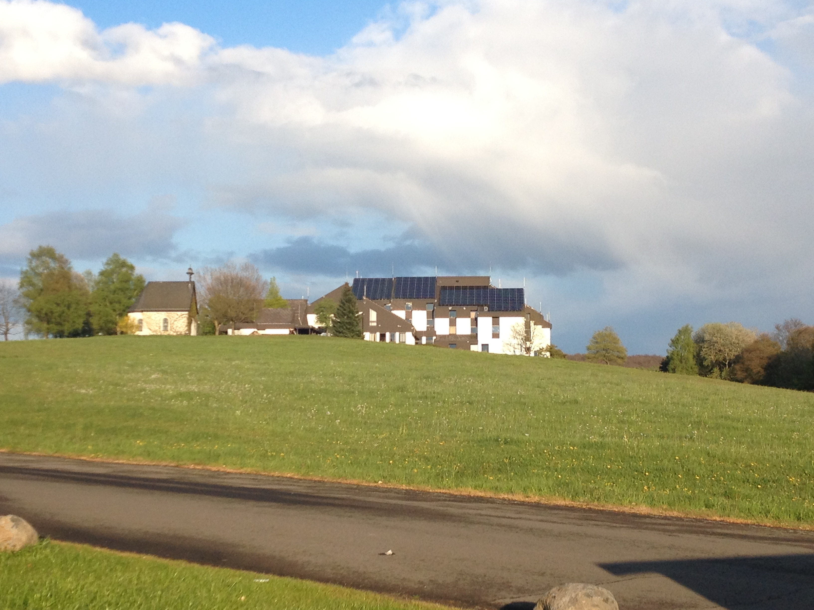 Das Gäste- und Tagungshaus Berg Moriah ist Sitz der Leitung des Schönstatt-Institut Diözesanpriester. Im Haus finden Treffen der Gemeinschaft statt. Zudem fungiert es als Gäste- und Tagungshaus